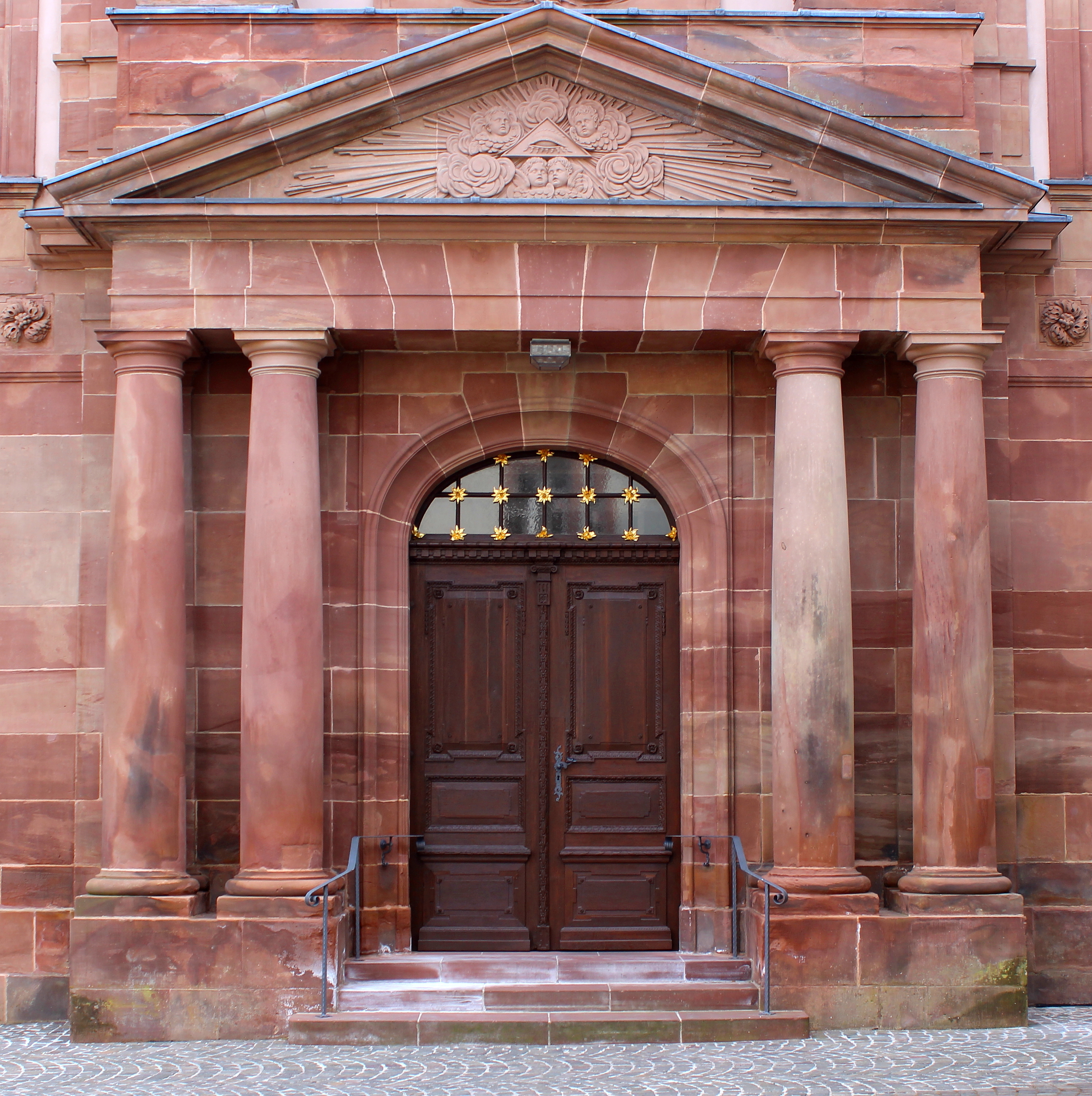 Portal der Schlosskirche Blieskastel, Saarland